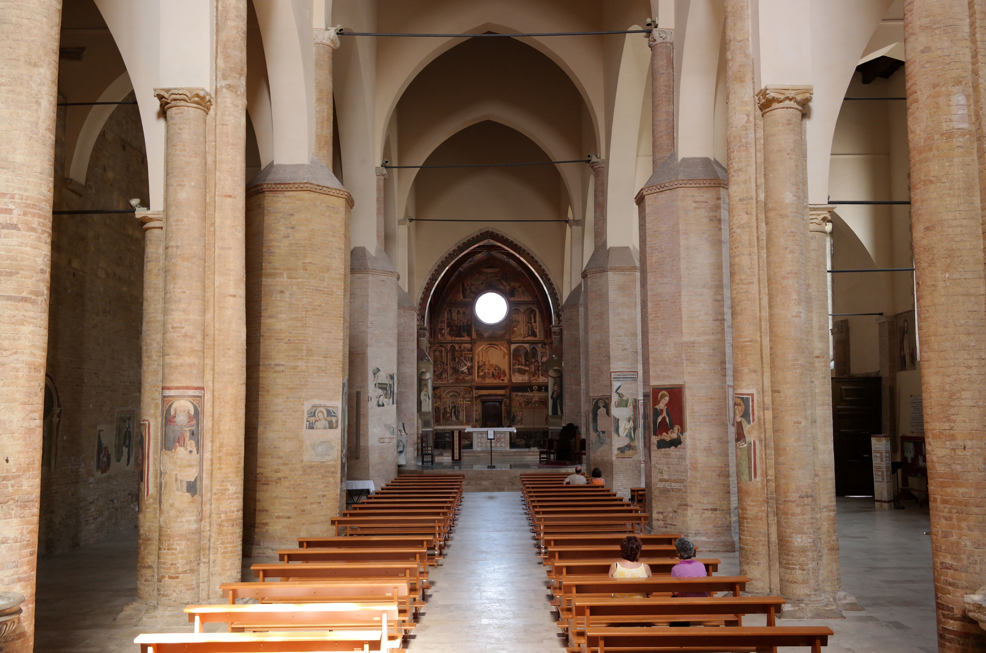 Interno della Concattedrale di di Santa Maria Assunta ad Atri